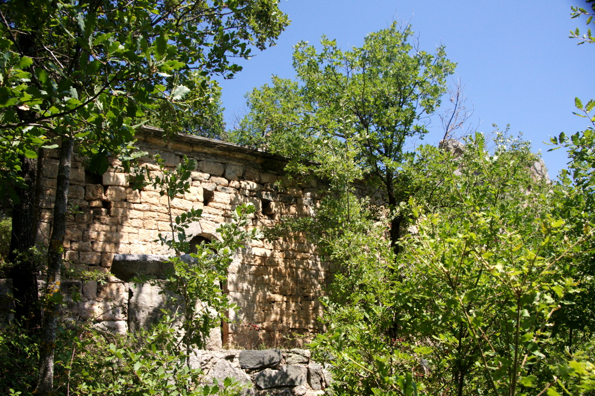 Ermita de Rocamora a Santorens (la Franja-Osca)